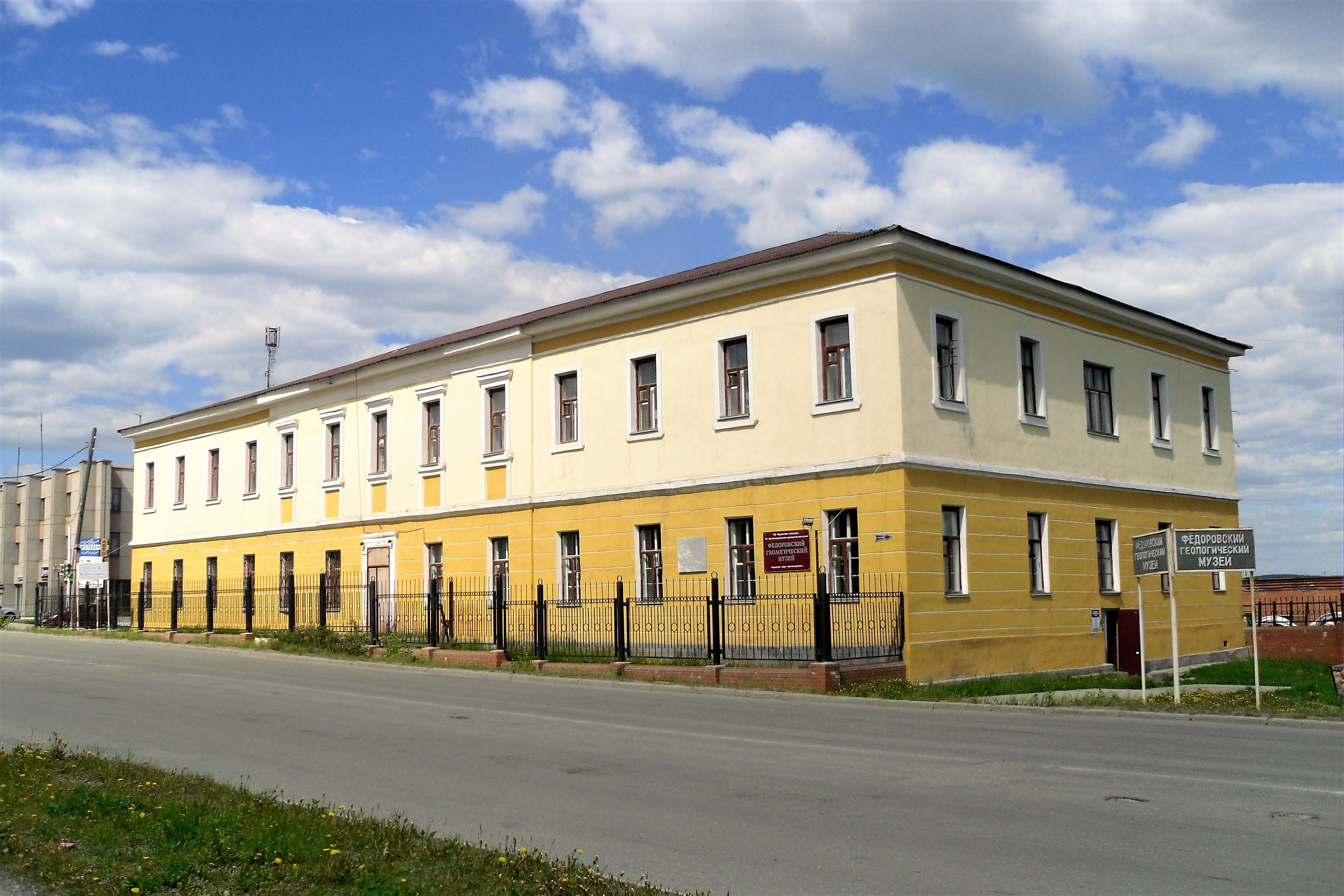 Фёдоровский геологический музей в Краснотурьинске